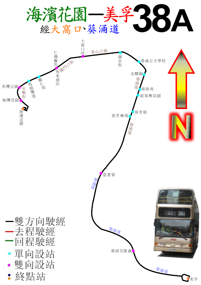 中文（香港）: 九巴38A線的走線圖